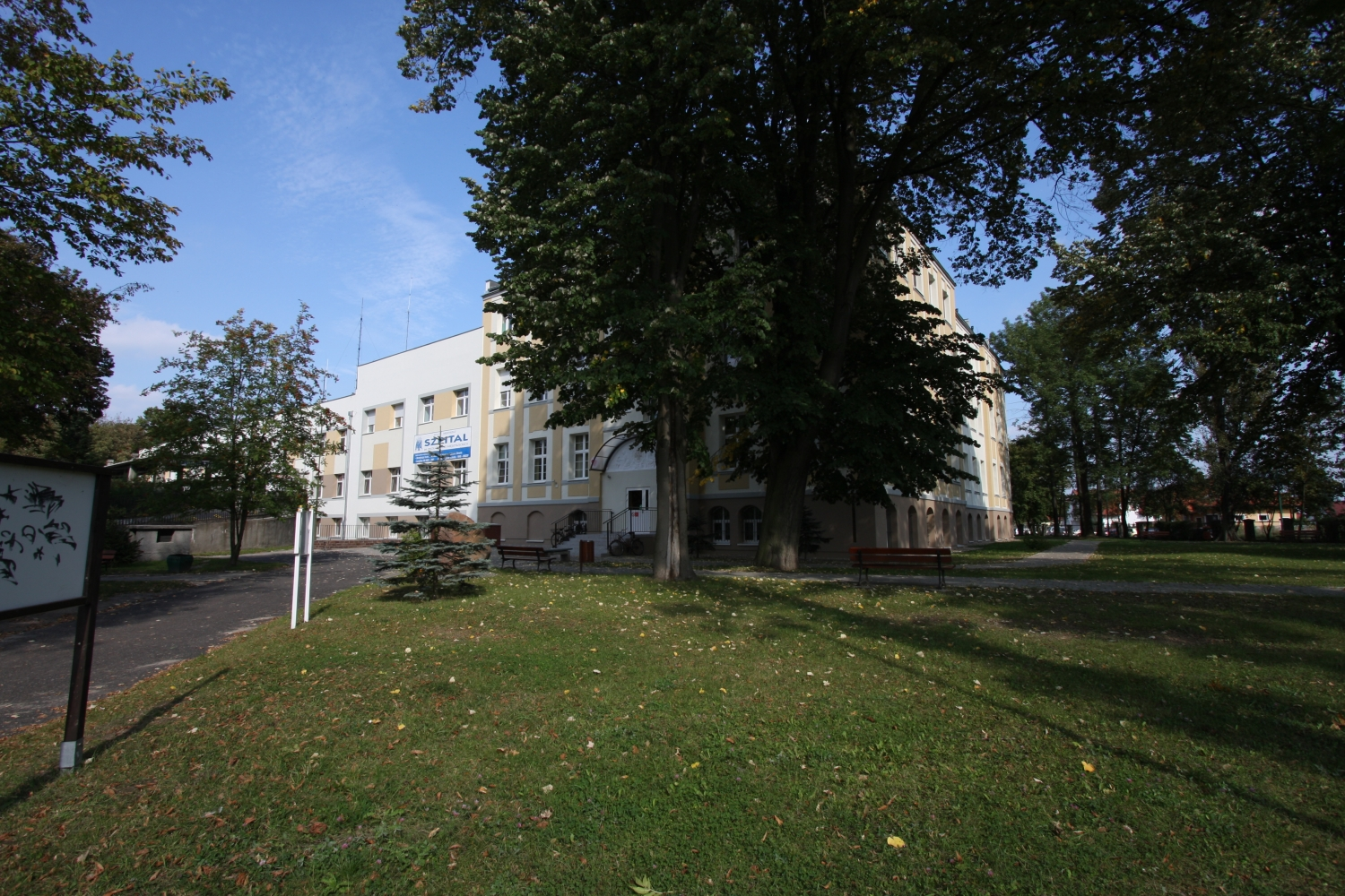 Międzyrzecz, szpital, tzw. polski, mur., XIX w.